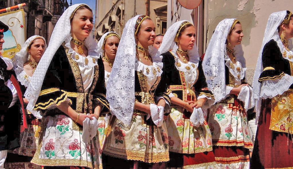 Bellezze di Sardegna